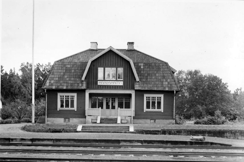 Hargshamns järnvägsstation vid Dannemora-Hargs järnväg